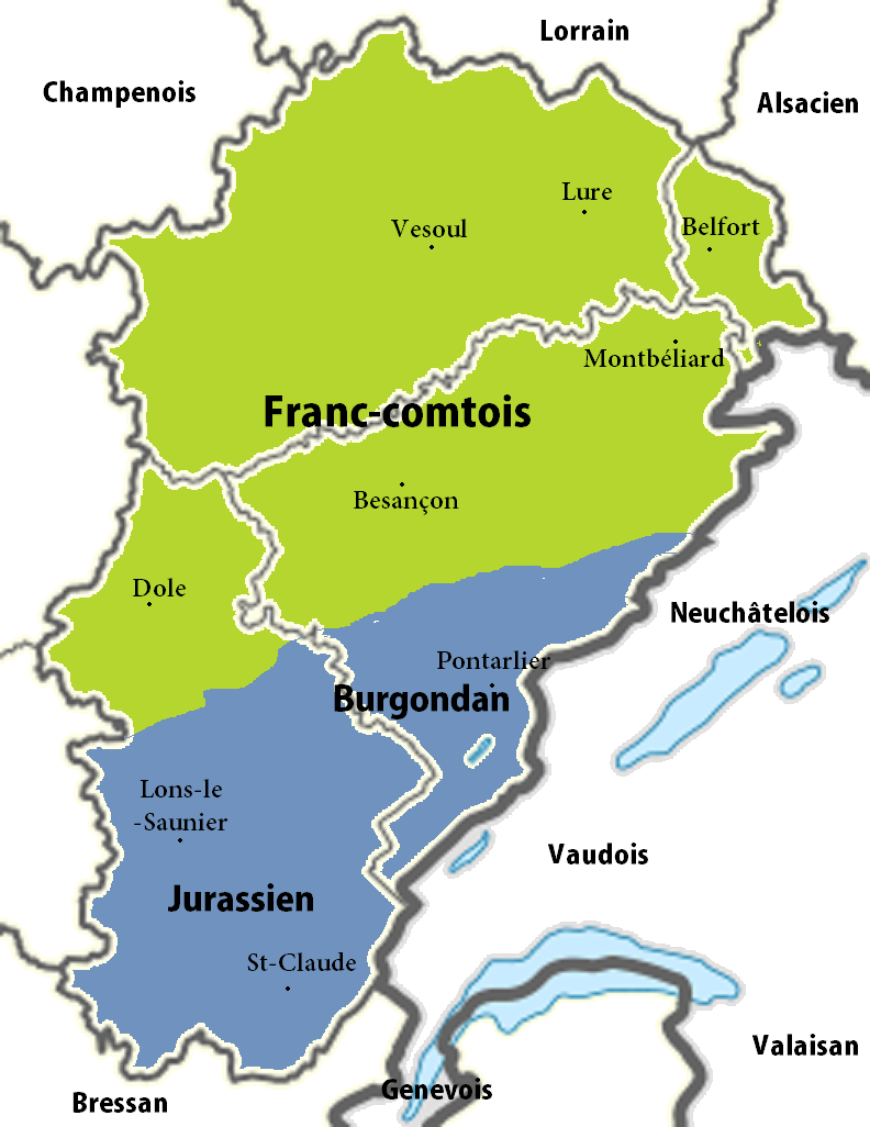 Carte linguistique de la Franche-Comté : Vert : Franc-comtois (langue d'oïl). Bleu : Arpitan ; dialectes burgondan et jurassien.